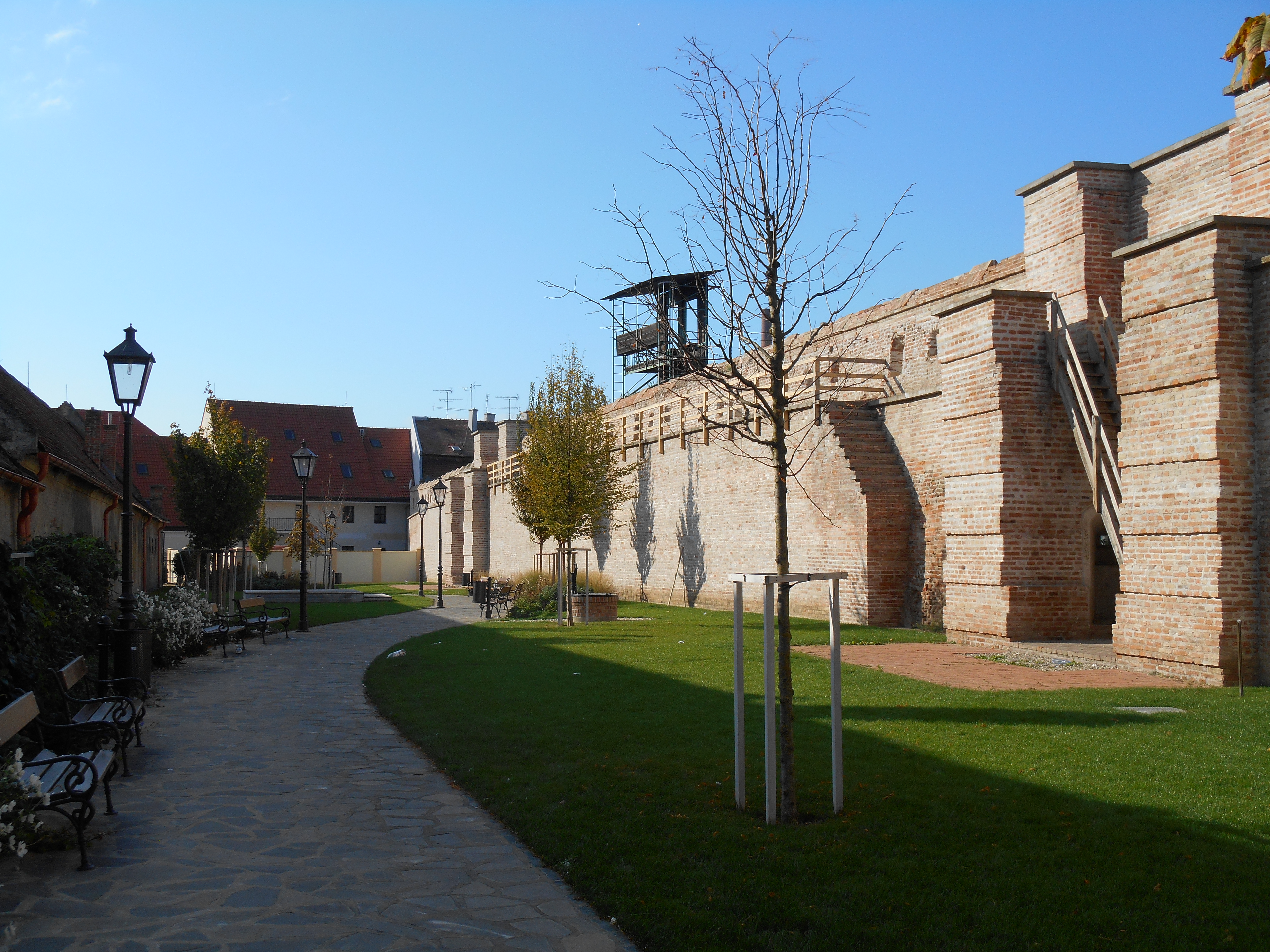 Slovakia - Trnava - Parčík Bela IV